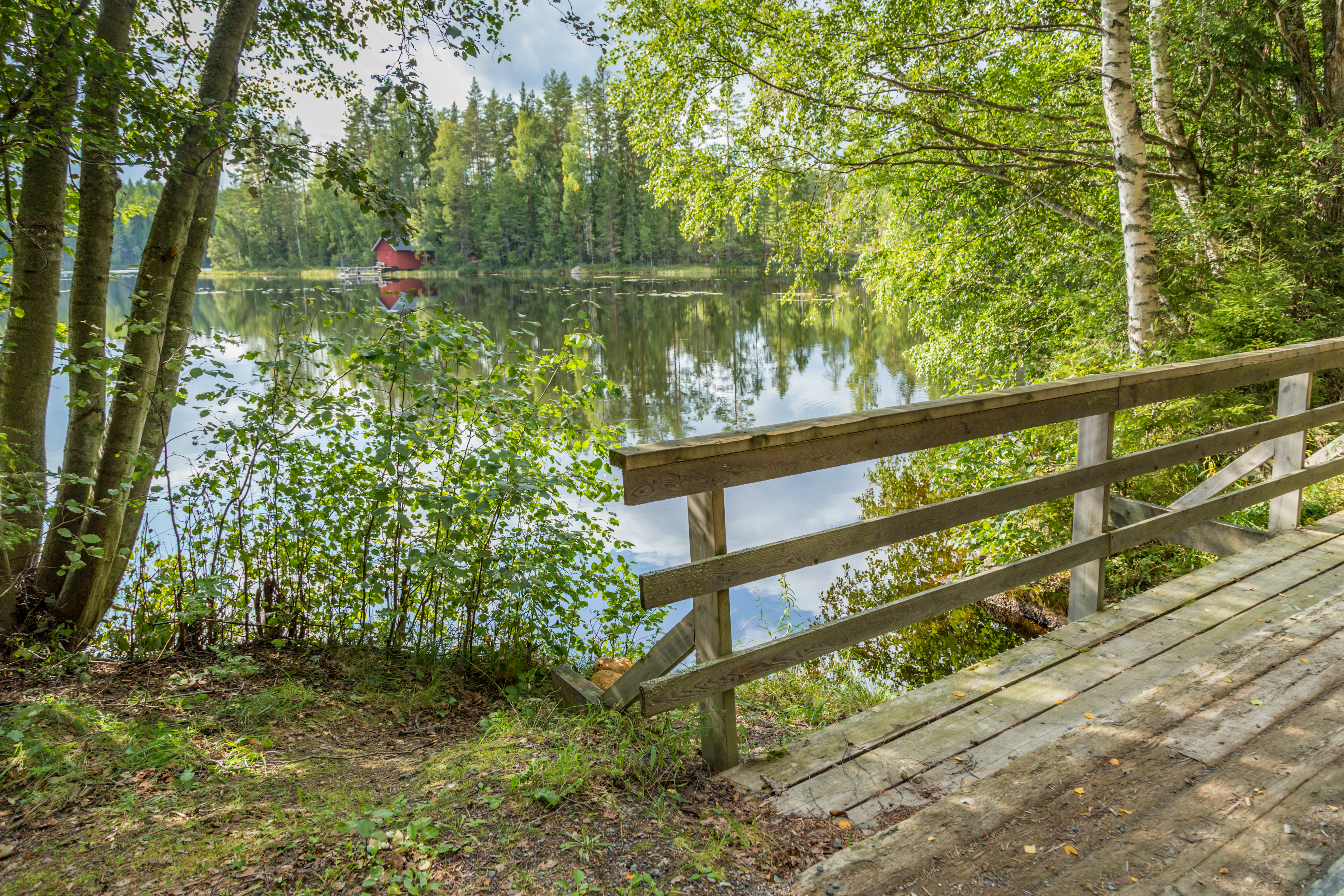 Håsjön, Hedemora kommun, Dalarnas län, Sverige. Utloppet till Lustån och vidare till Turbodammen.